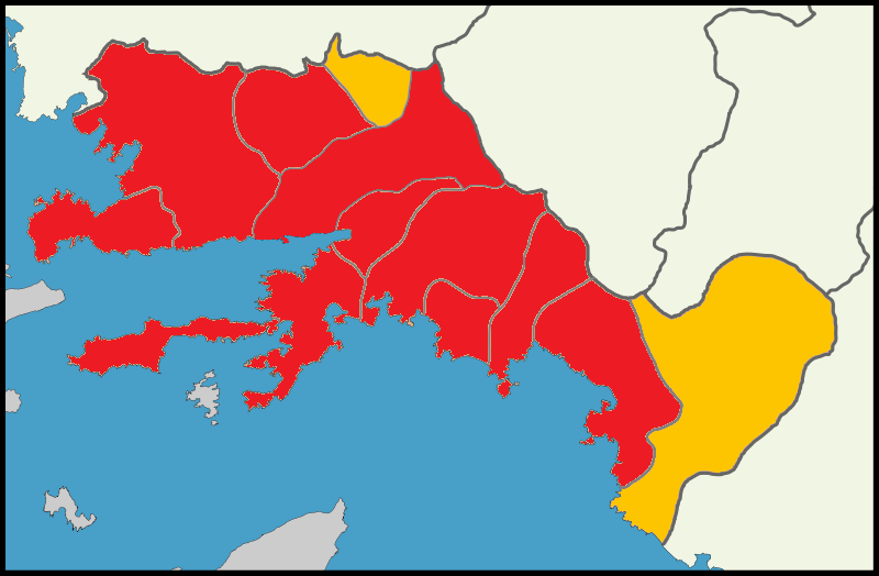 Muğla'da 2014 Türkiye cumhurbaşkanlığı seçimi